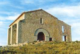 Ermita de Sant Vicent de Catí (l'Alt Maestrat, País Valencià). 02.042-004.